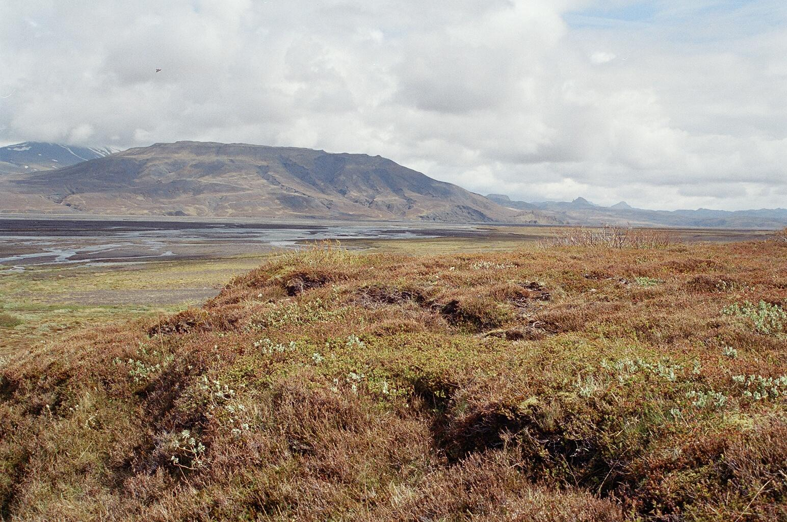 Das Tal des Markarfljót unweit der Thórsmörk. Südisland. Von mir selbst im Juni 2005 aufgenommen. GNU-FDL, Reykholt 22:06, 22. Jun 2005 (CEST)